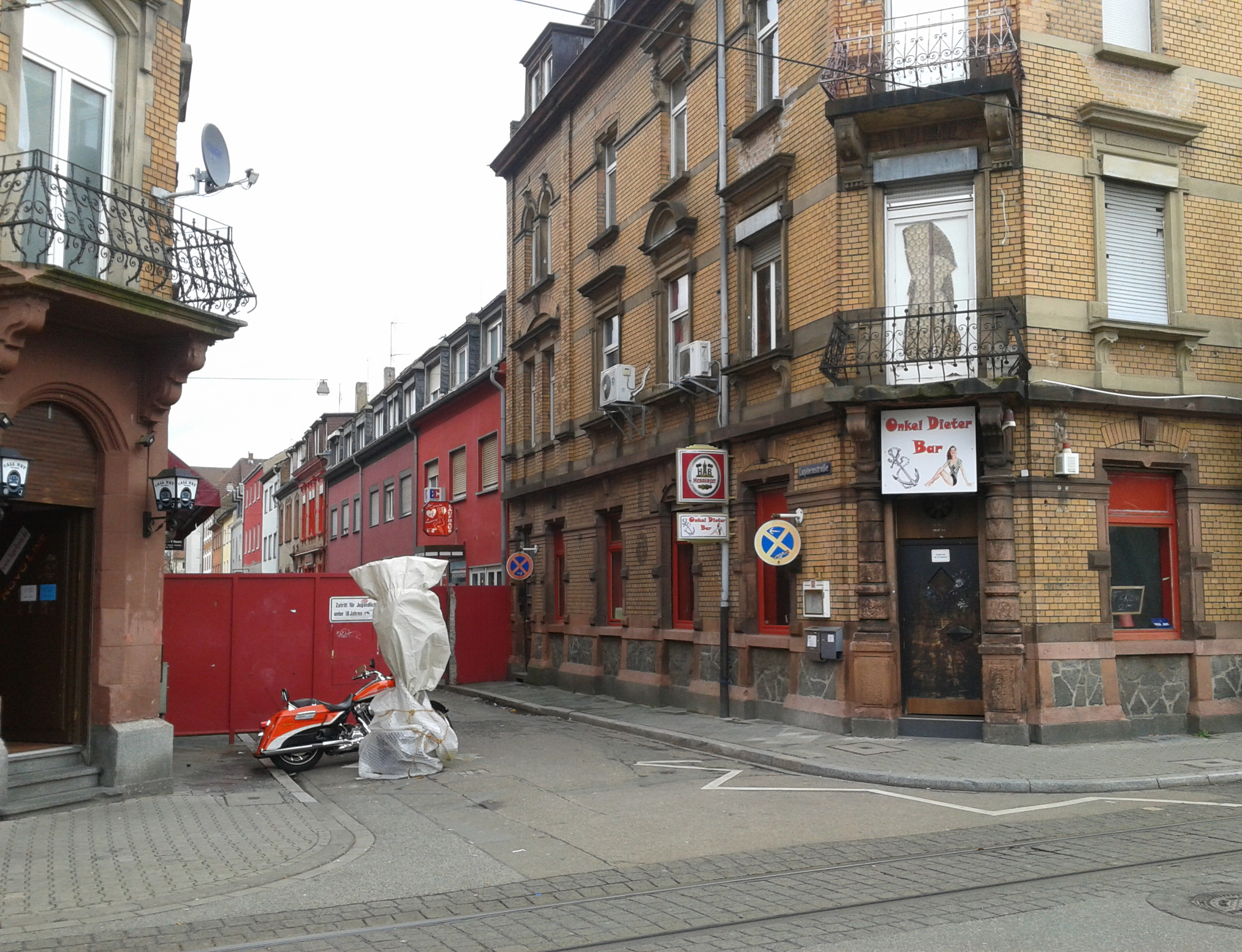 Die "Neunzehn", Rotlichtmeile in der Mannheimer Neckarstadt. Rechts die "Onkel Dieter Bar", ehemals "The Other Place" von den Hells Angels